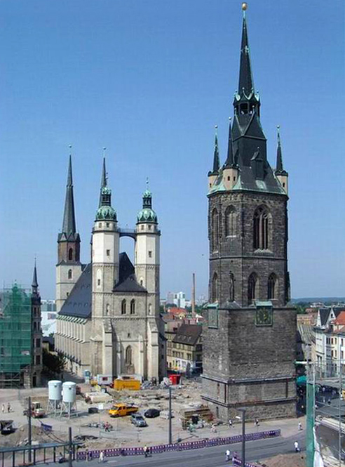 Roter Turm, Markt und Marktkirche in Halle (Saale)